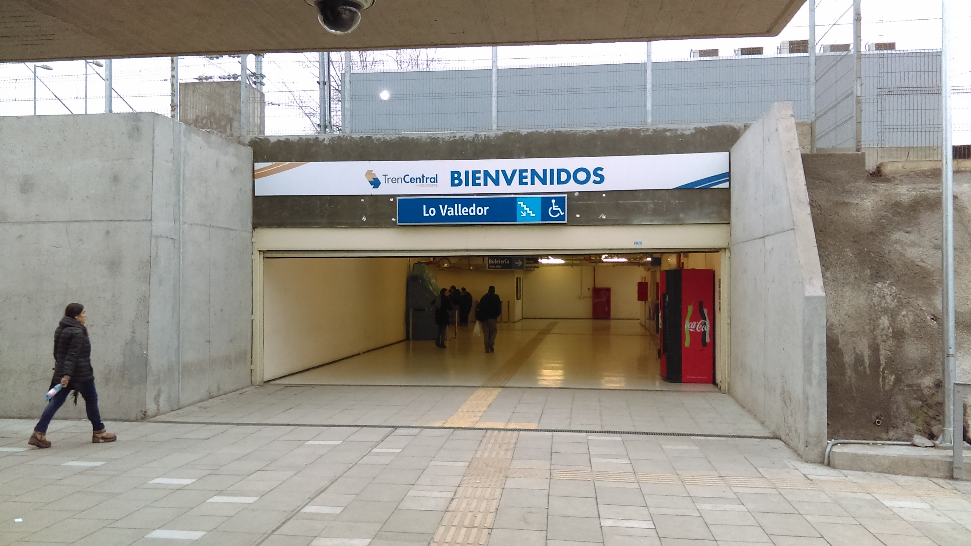 Ingreso a la estación Lo Valledor del Metrotren Nos